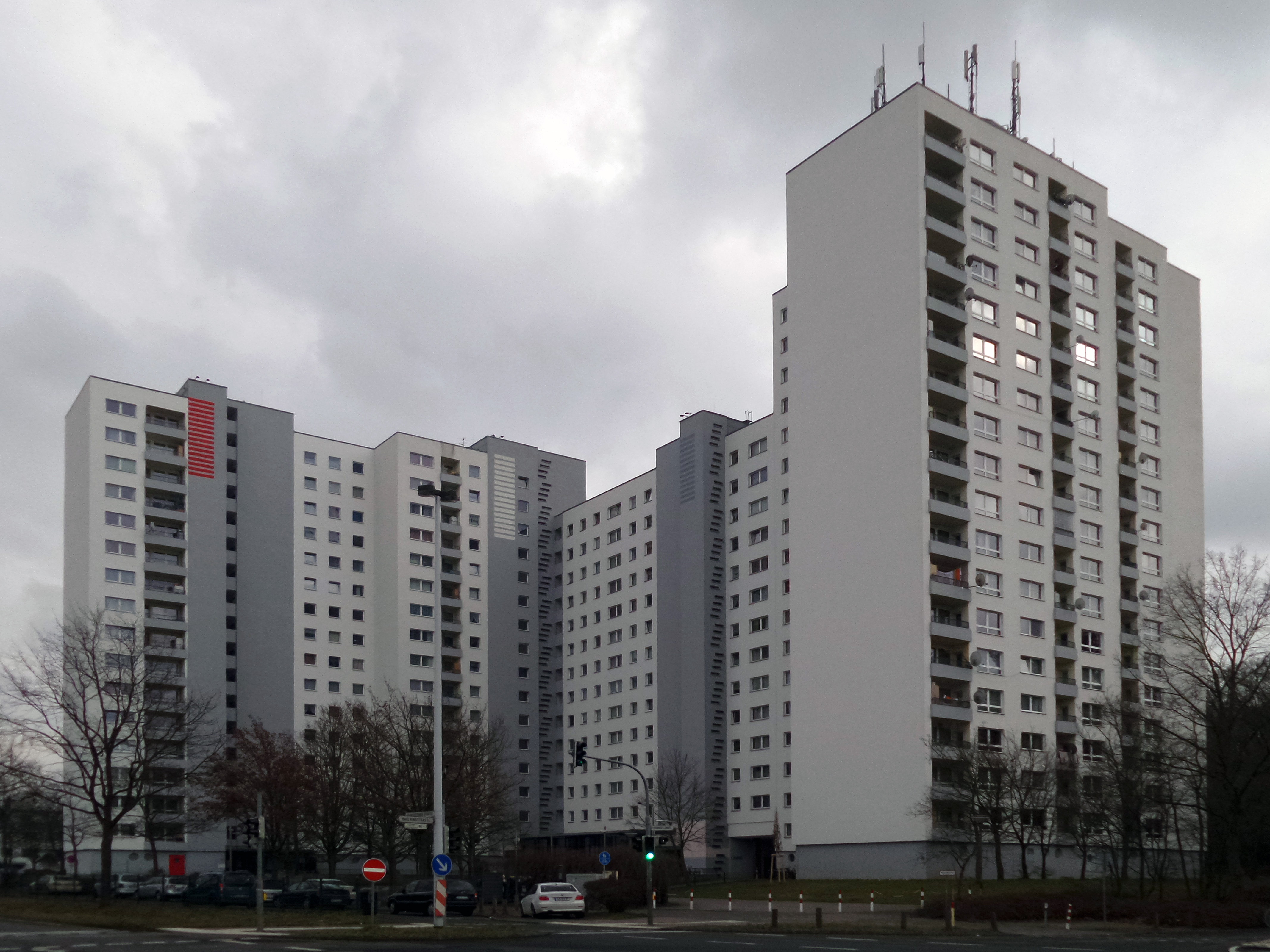 Pfannmüllerweg 40-46 in Darmstadt-Kranichstein